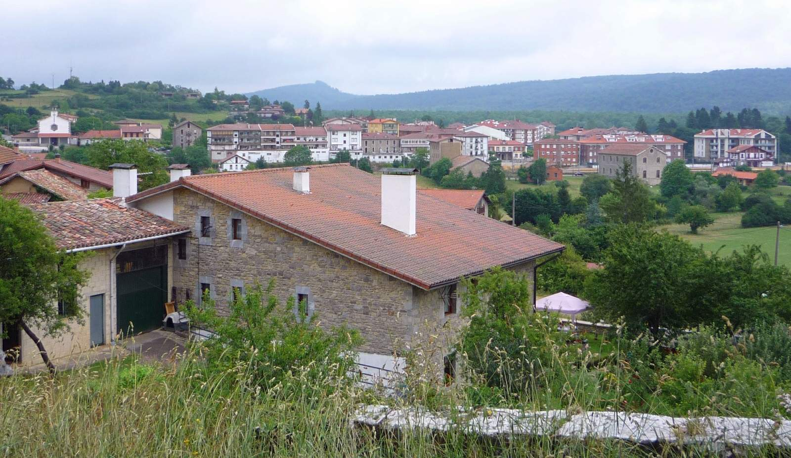 Izarra (Urkabustaiz, Álava)